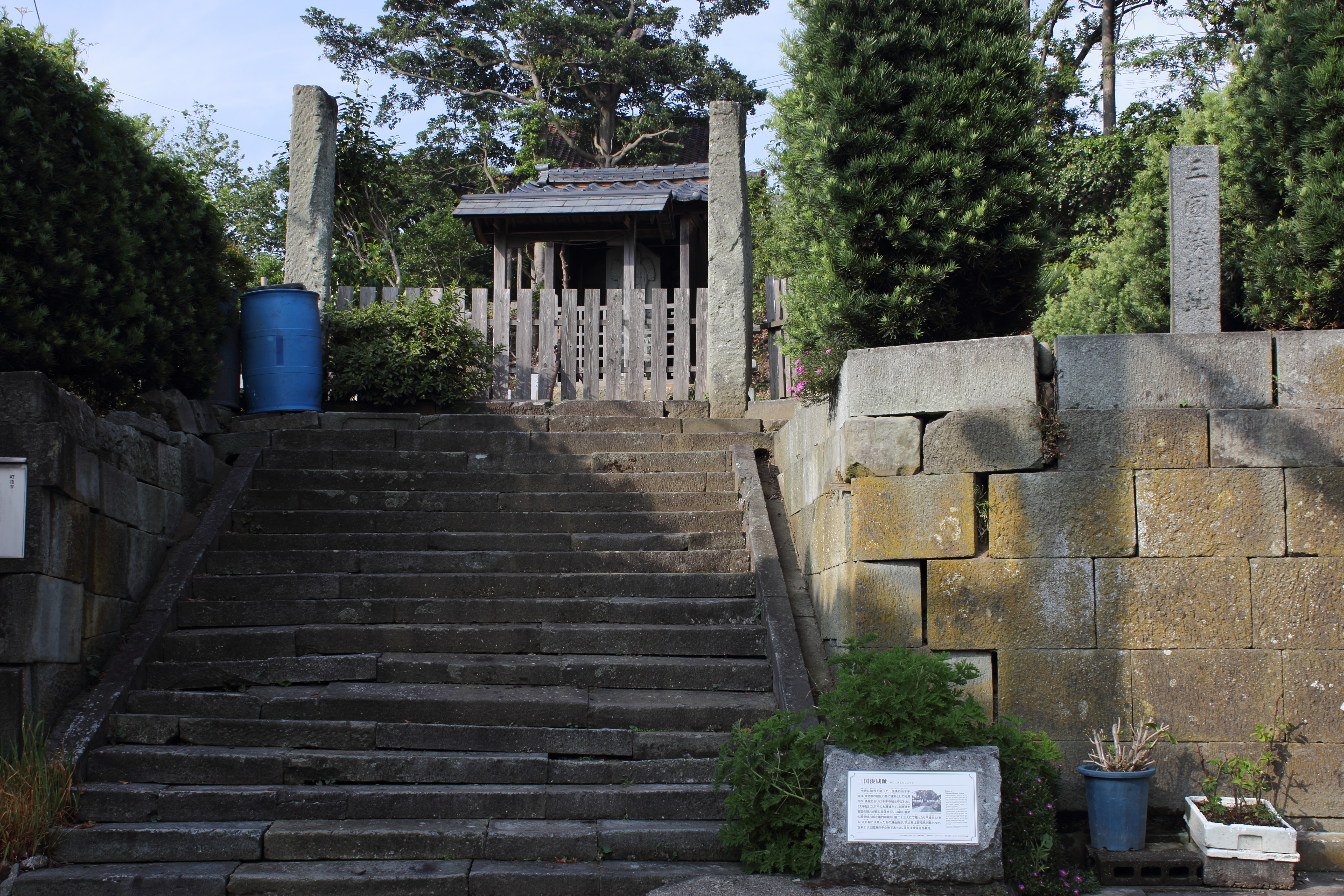 三国湊城跡